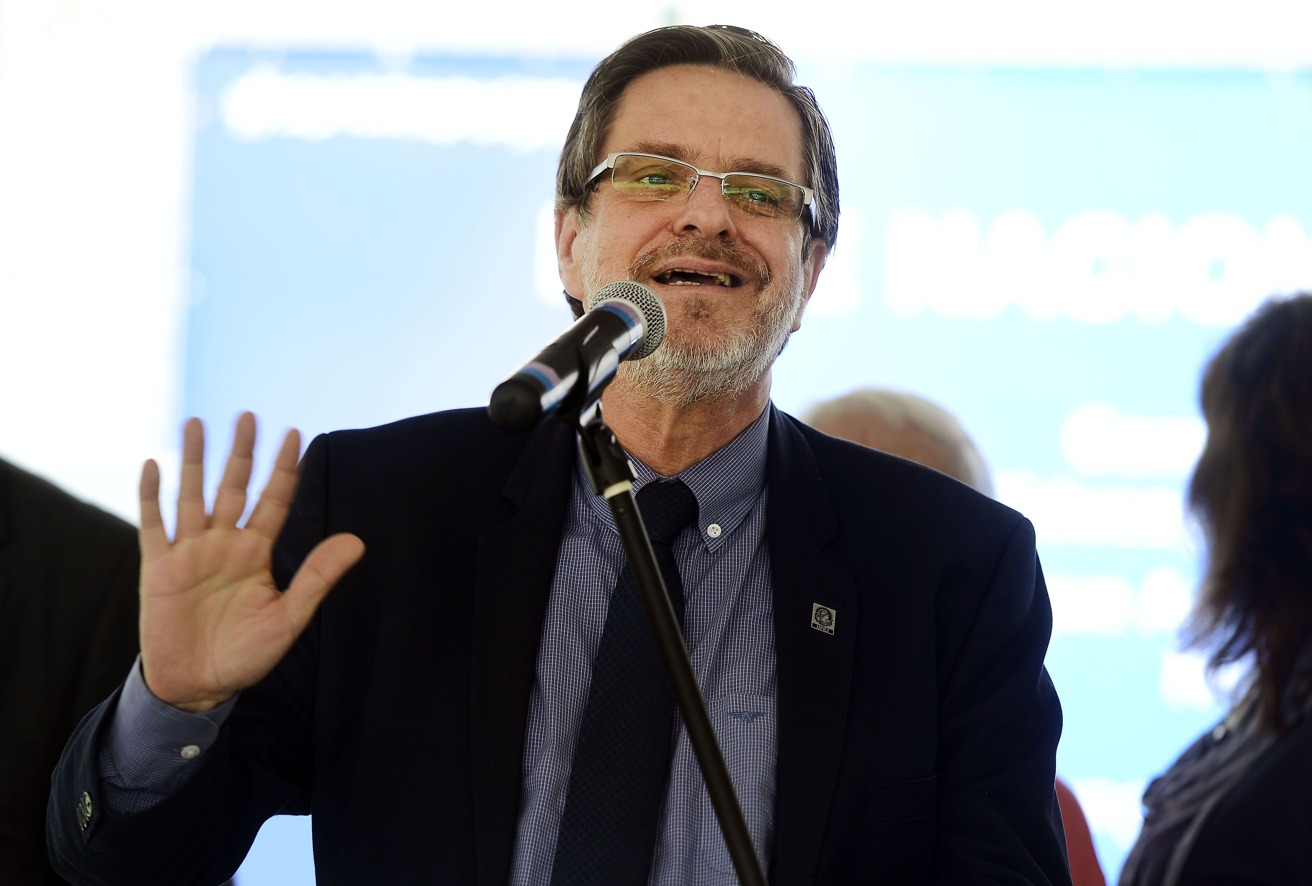 Rio de Janeiro - Reitor da UFRJ, Roberto Leher, durante inauguração de complexo esportivo no campus da Ilha do Fundão (Tomaz Silva/Agência Brasil)